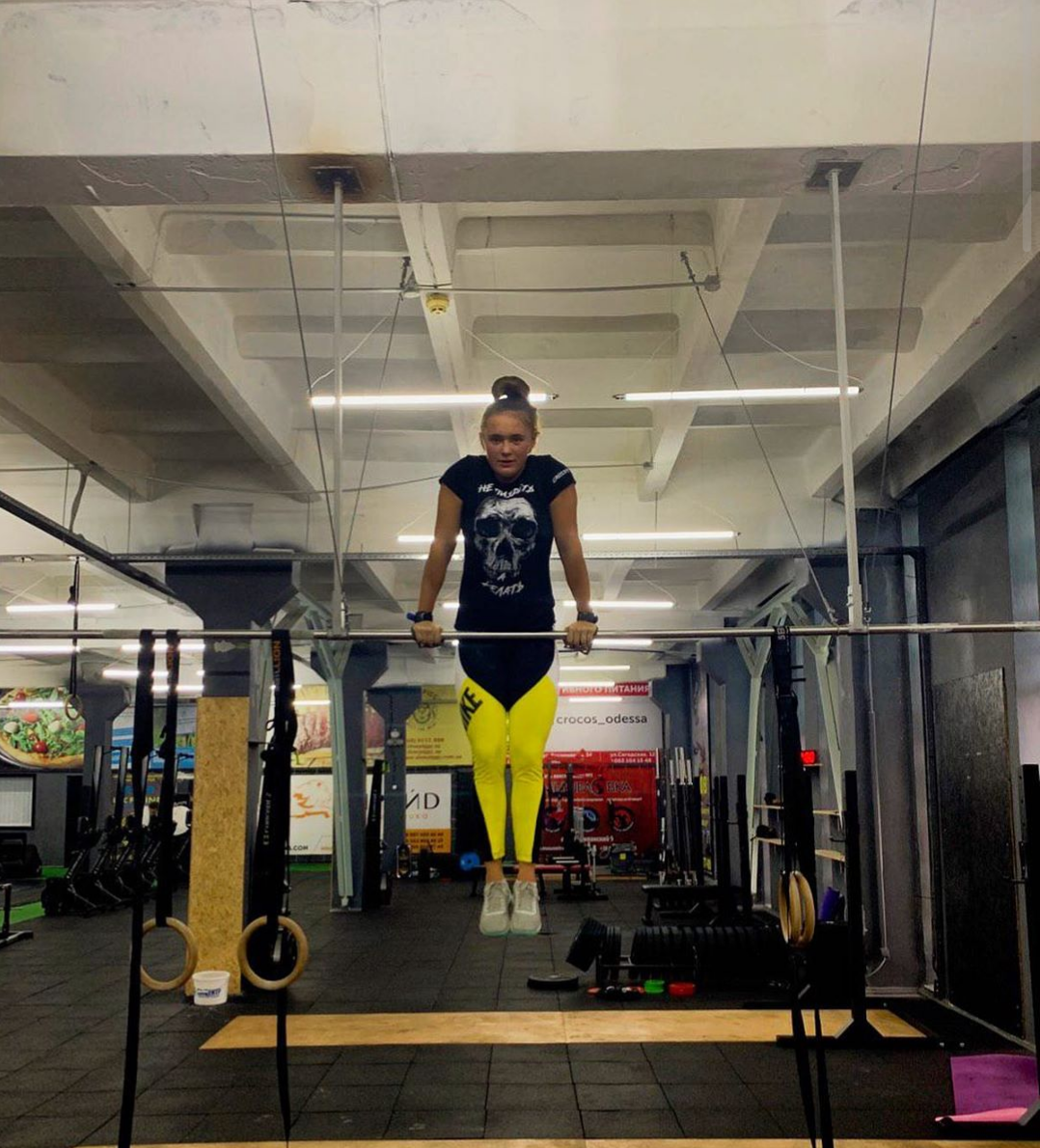 Девушка-кроссфитер выполняет спортивное упражнение